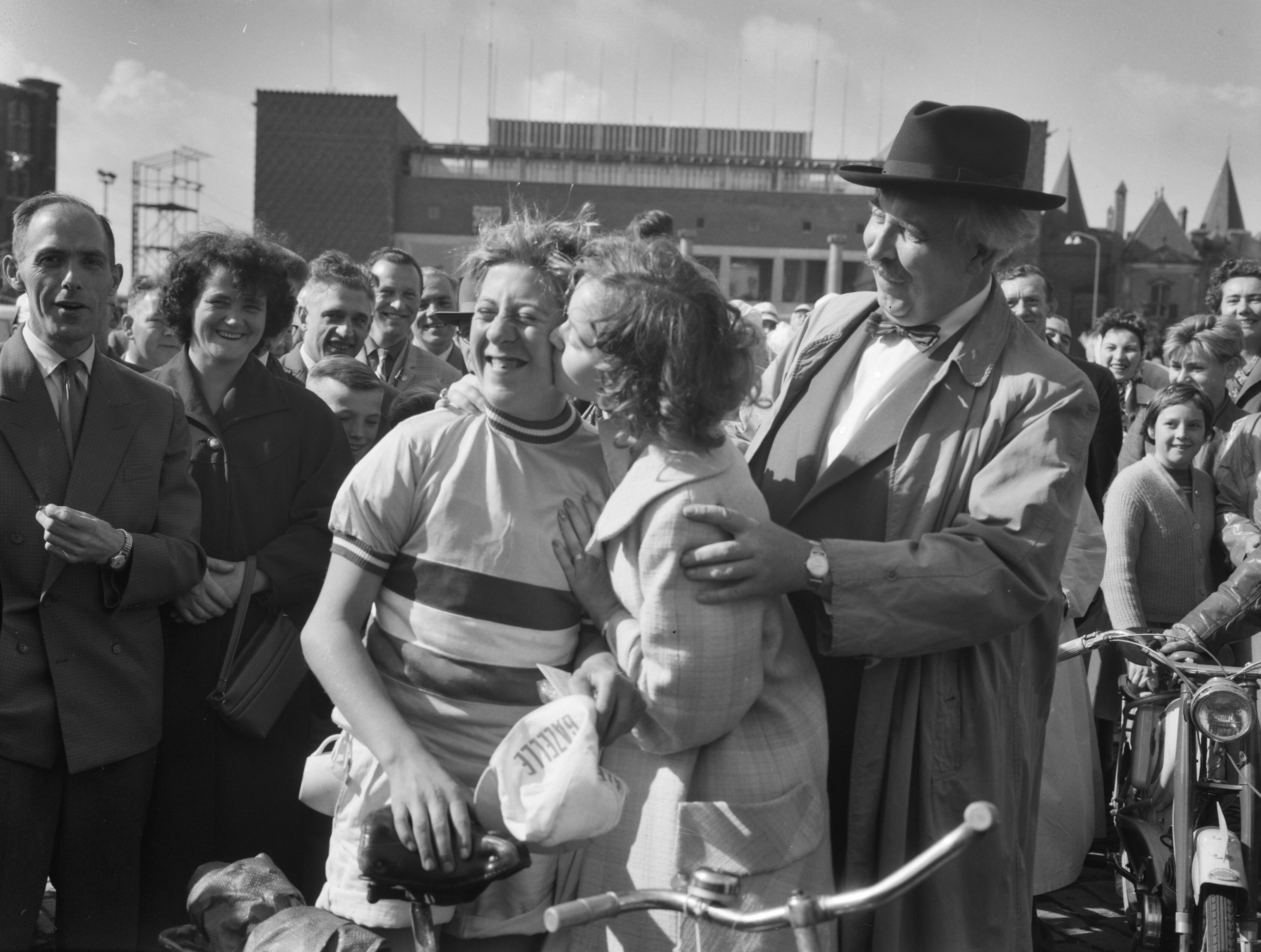 Collectie / Archief : Fotocollectie Anefo Reportage / Serie : [ onbekend ] Beschrijving : Tour de Verenigde Naties in Arnhem gestart, acteur Hans Tiemeyer met moeder die één van de rennertjes ten afscheid kust Datum : 18 juni 1960 Locatie : Arnhem, Gelderland Trefwoorden : acteurs, evenementen, kinderen, sport, toneelspelers, wielrennen Persoonsnaam : Tiemeyer, Hans Fotograaf : Rossem, Wim van / Anefo Auteursrechthebbende : Nationaal Archief Materiaalsoort : Negatief (zwart/wit) Nummer archiefinventaris : bekijk toegang 2.24.01.04 Bestanddeelnummer : 911-4334